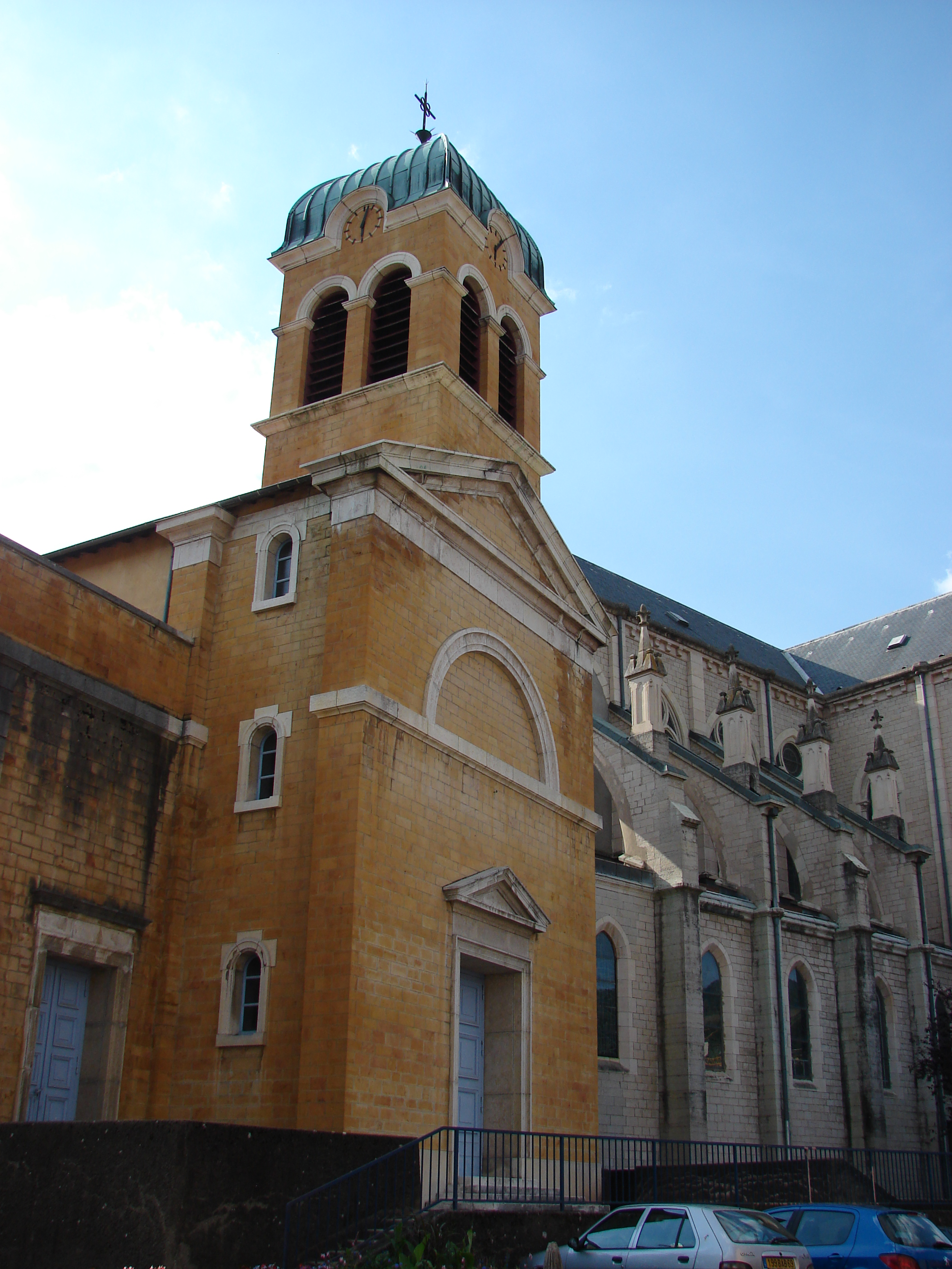 Eglise St André de Tarare Photos Monique FARCY